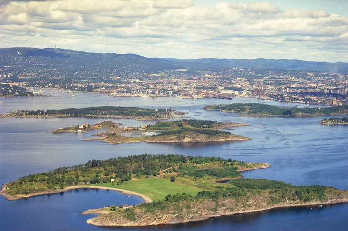 Langøyene in Oslo, Norway